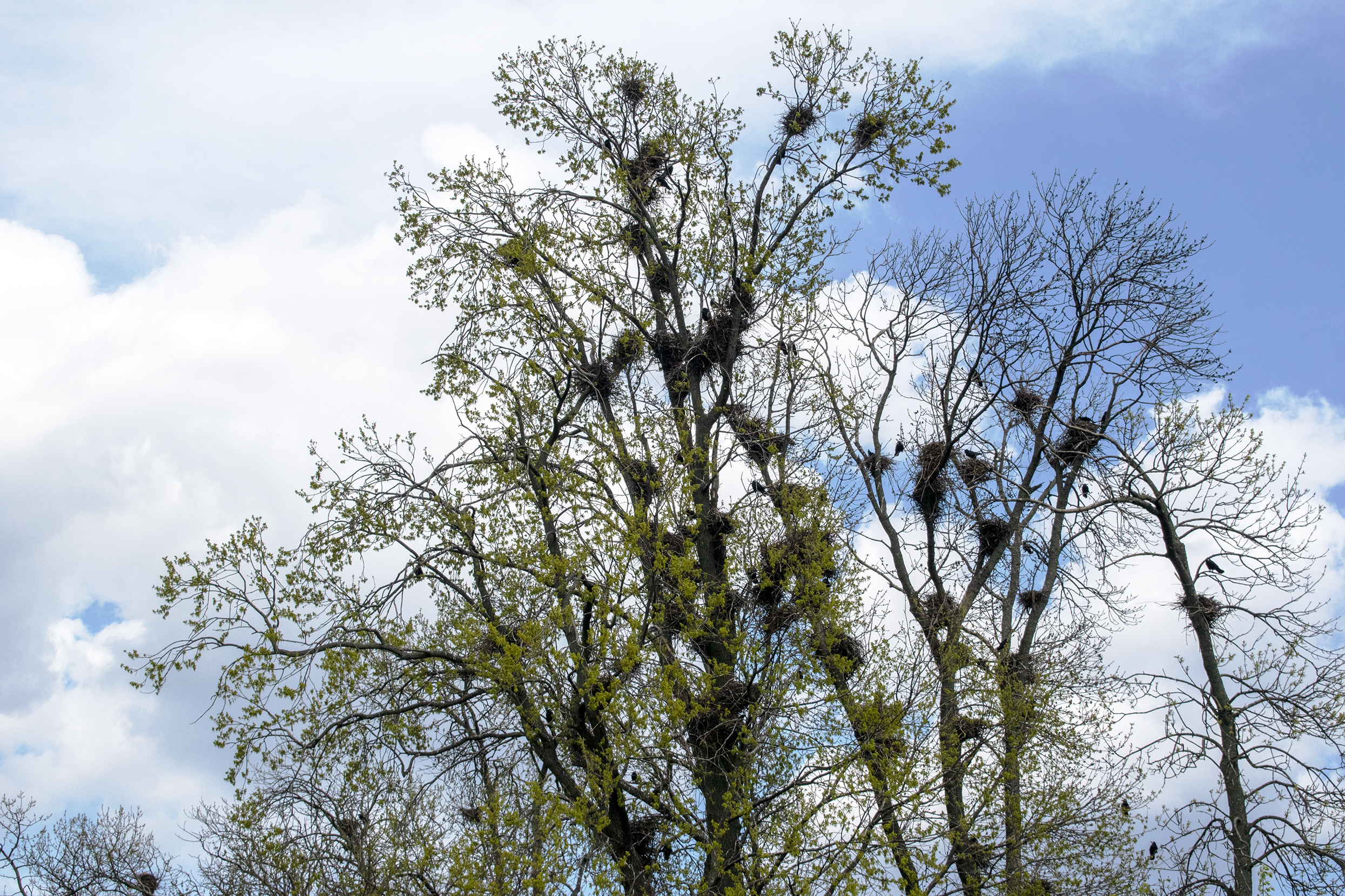 Гніздування ворона звичайного на деревах у Луцьку, Україна, квітень 2020 року